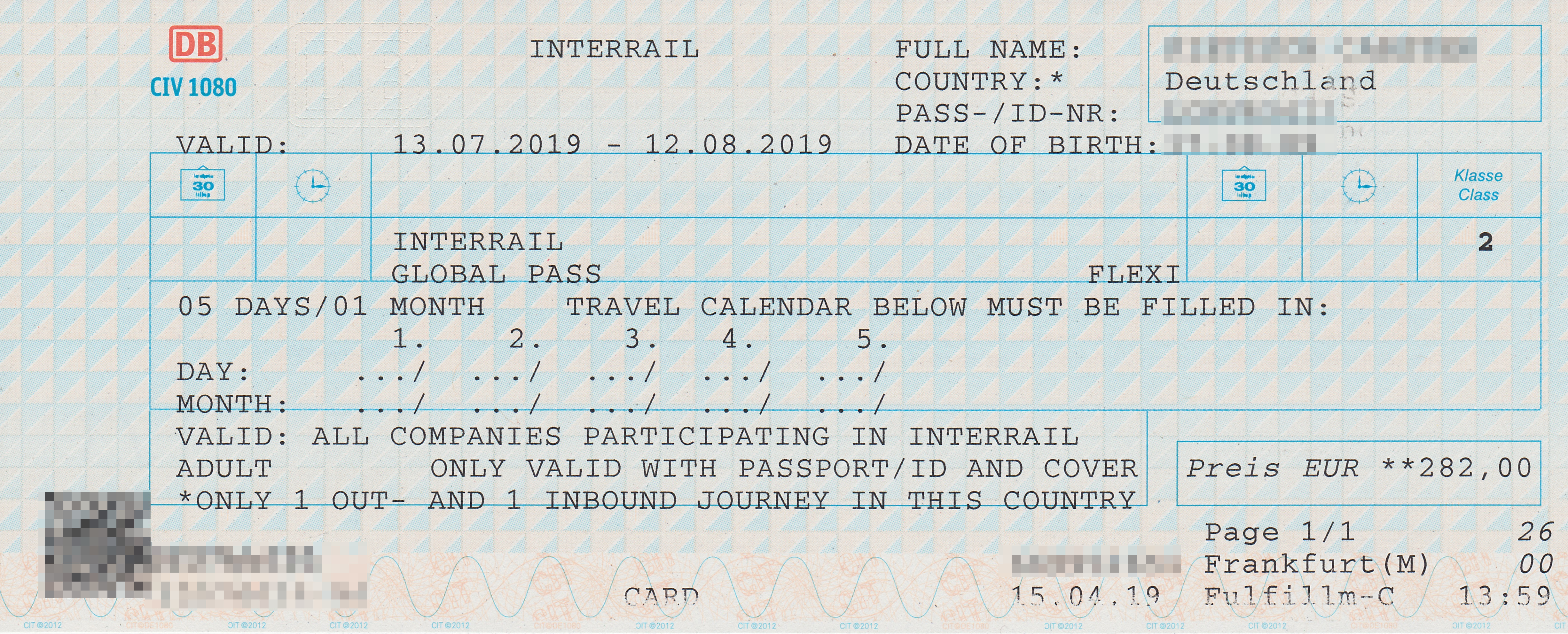 Interrailticket Deutsche Bahn 2019